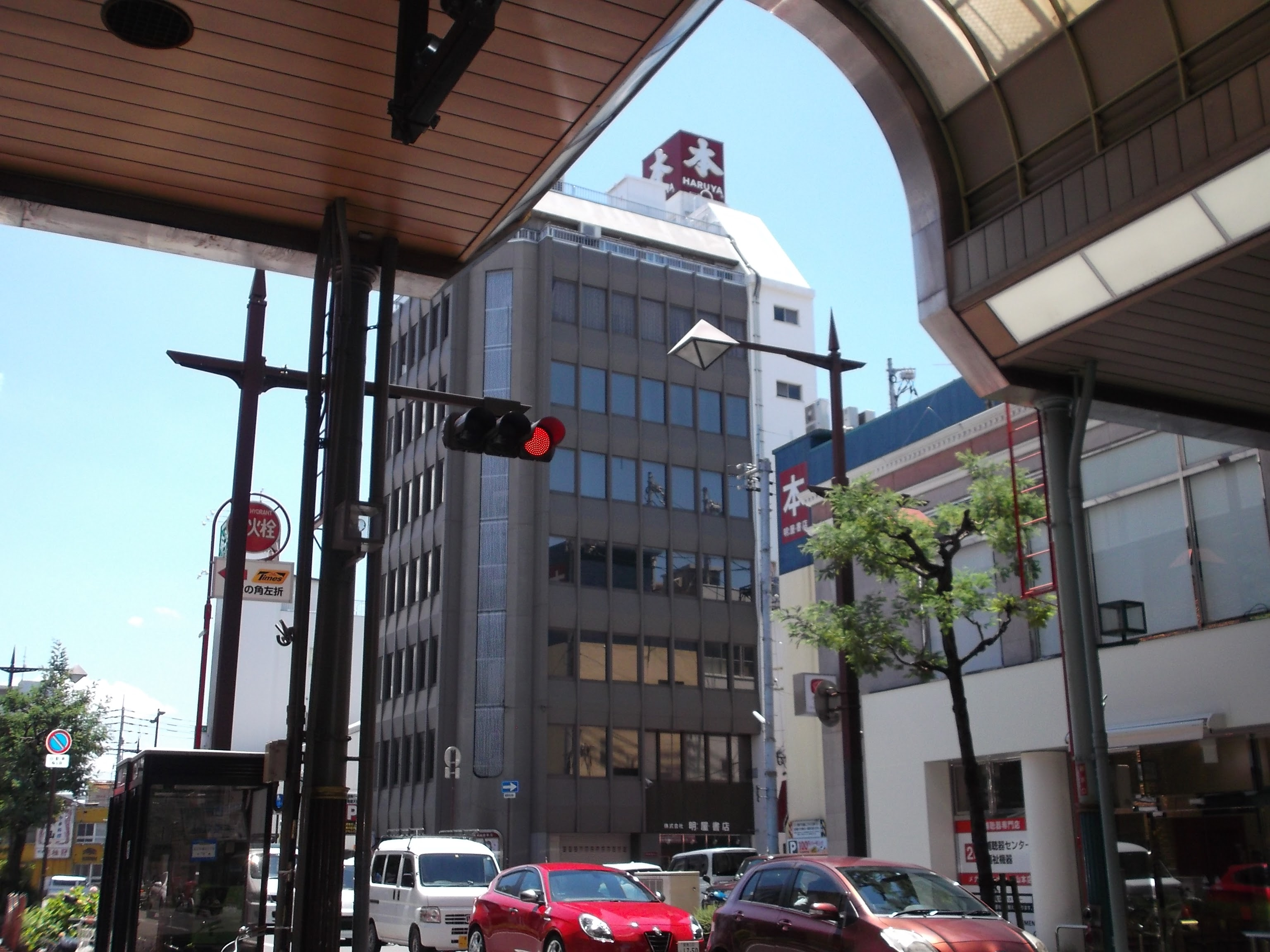 明屋書店本社